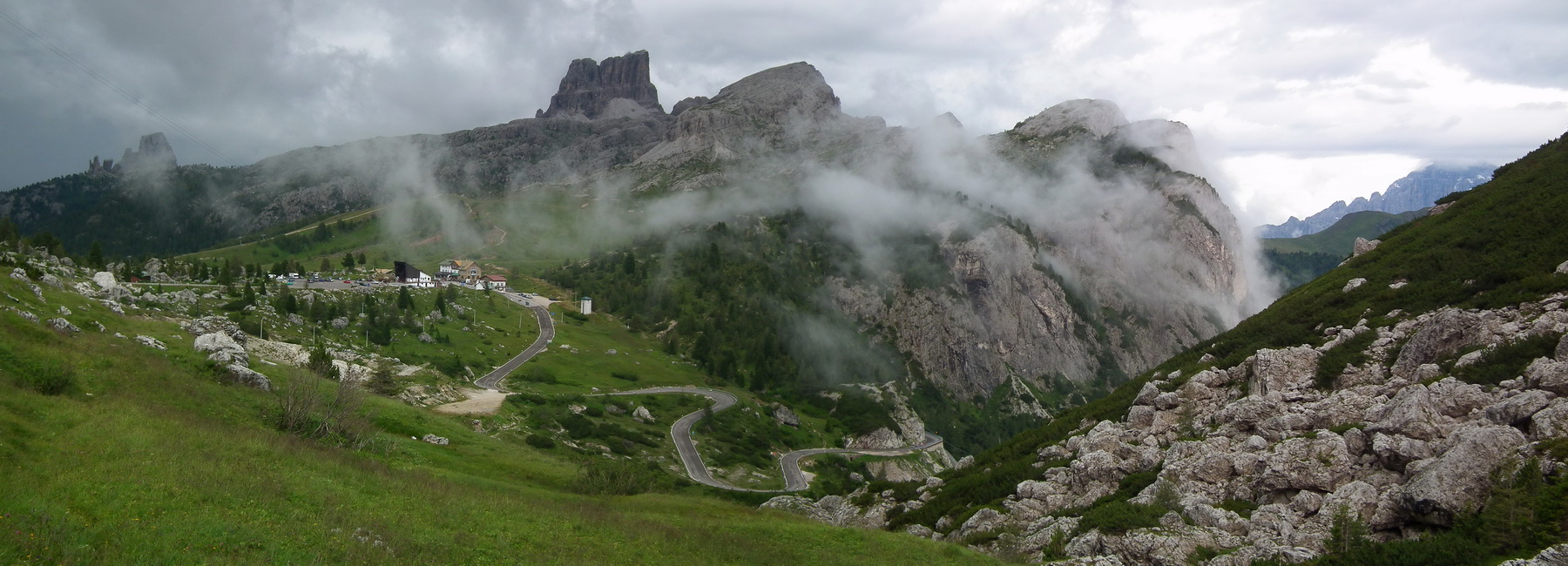 Passo di Falzarego, Belluno, Italy